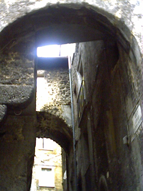 Arco della Zazzarotta (Scanno, provincia dell'Aquila)